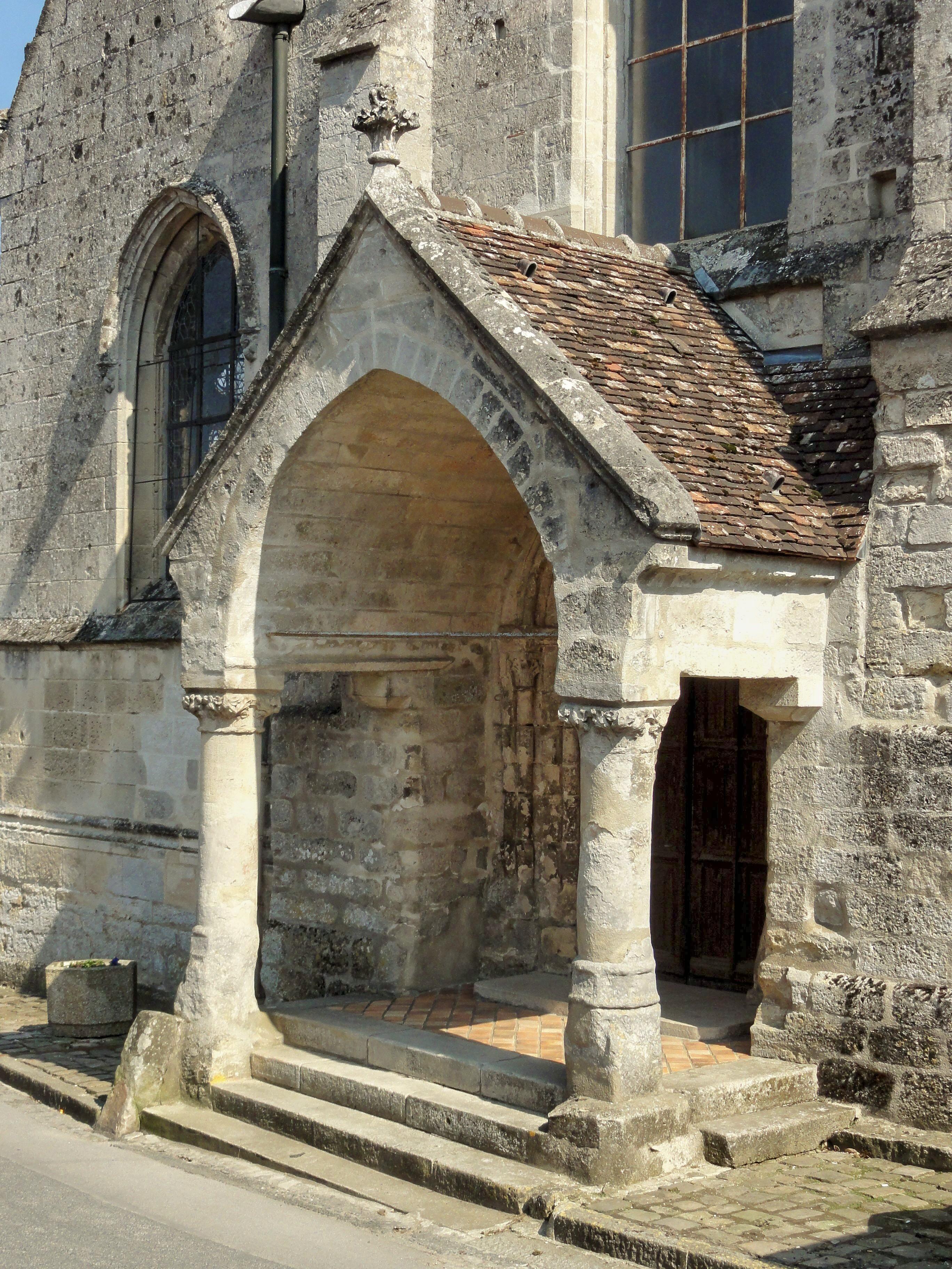 Porche devant la façade occidentale.